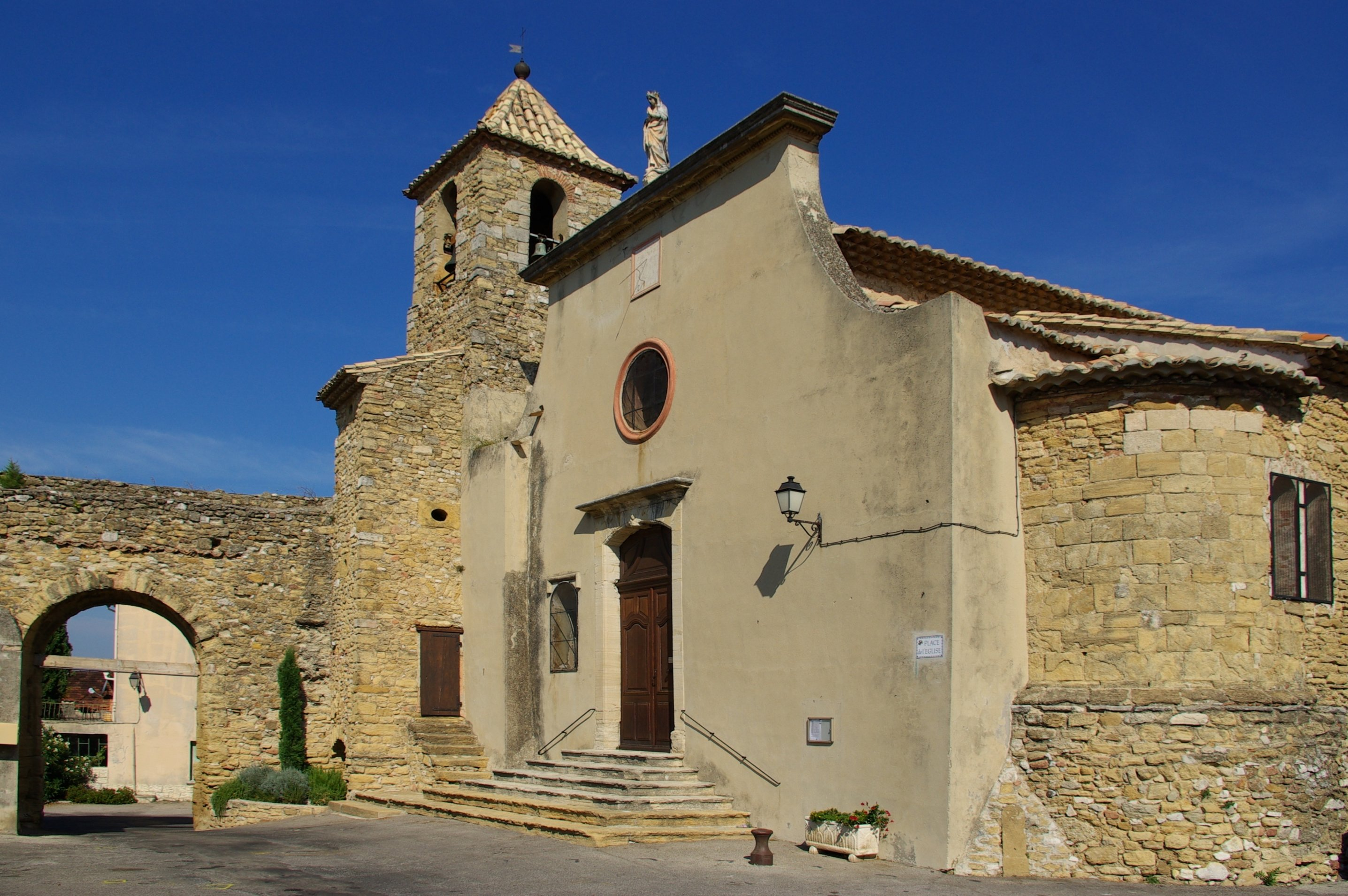 Eglise de Vacqueyras